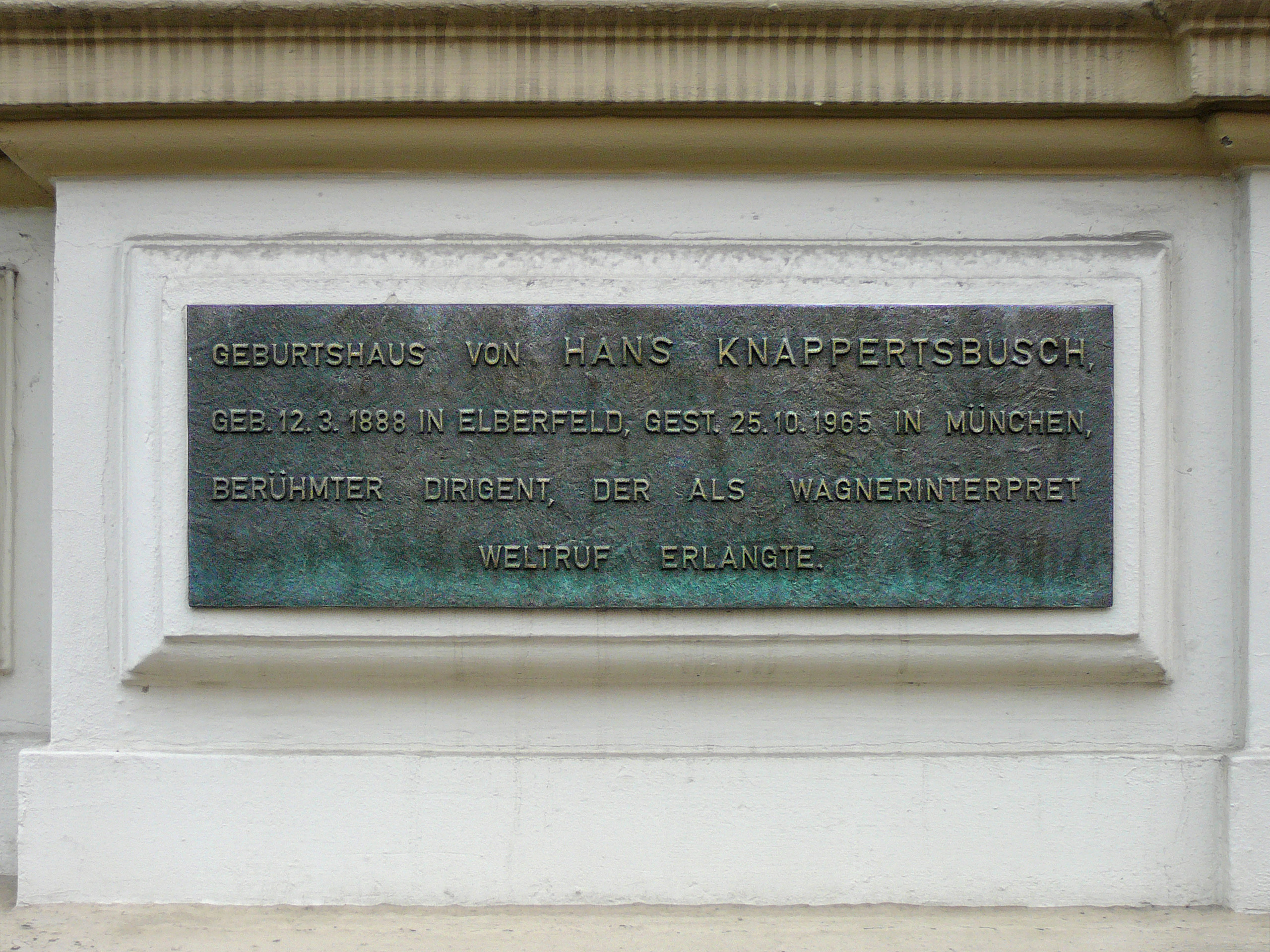 Funckstraße, Wuppertal